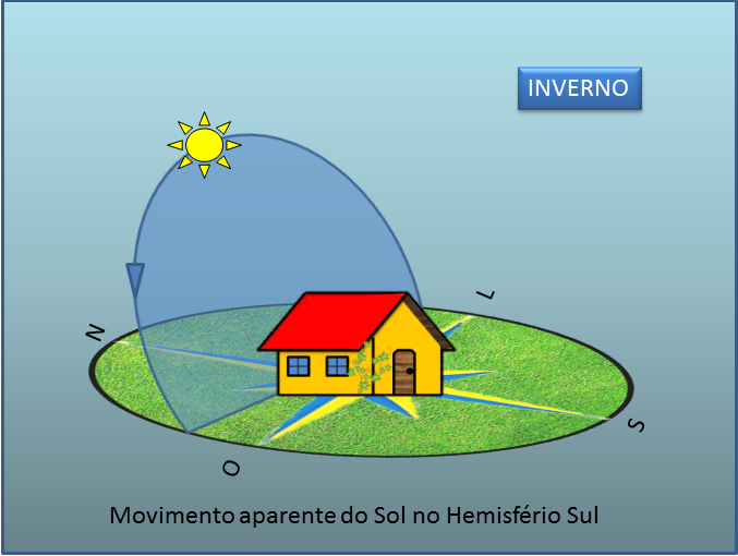 Movimento Aparente do sol no Hemisf. Sul